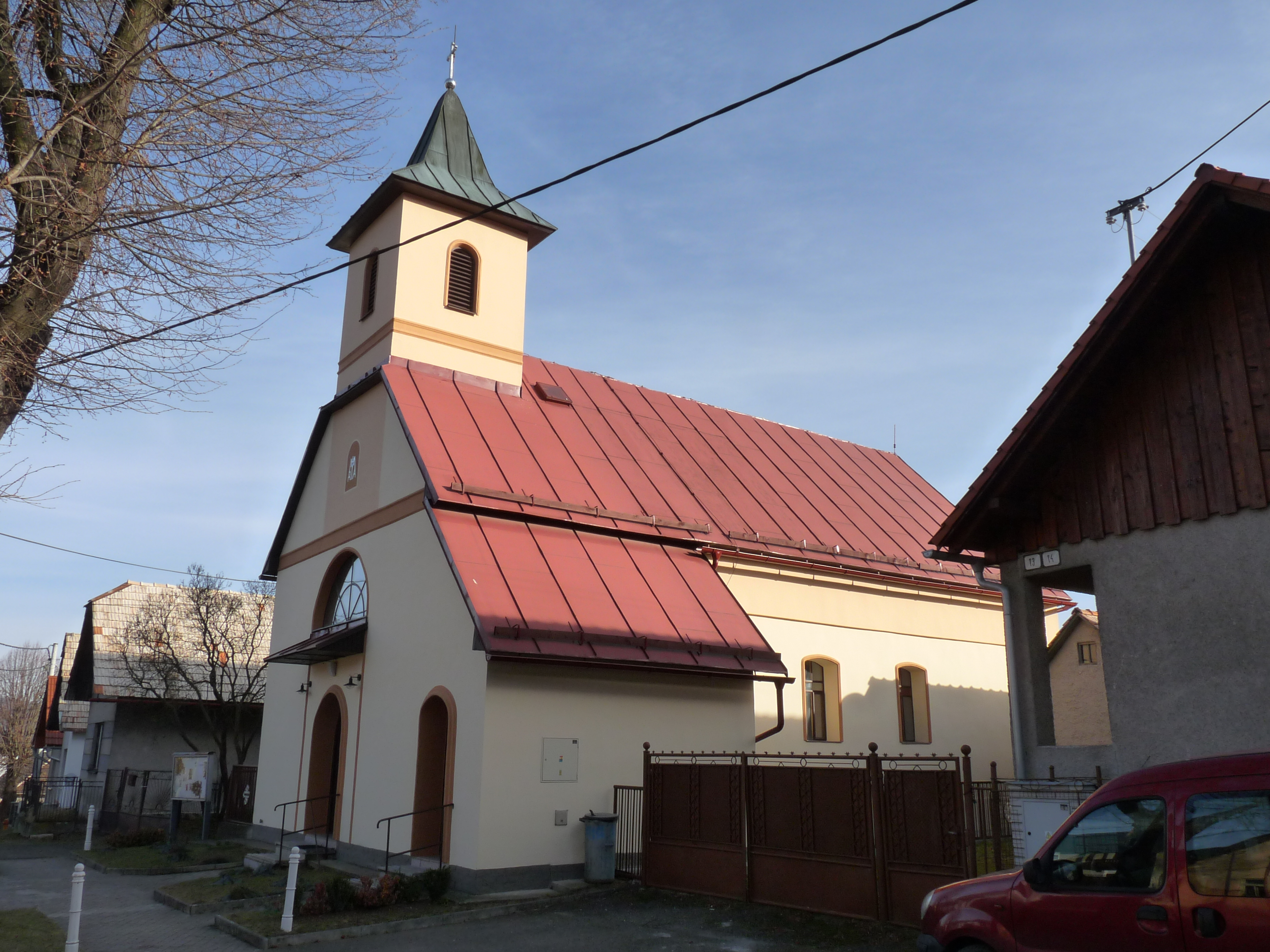 Kostol Ružencovej Panny Márie v Repišti